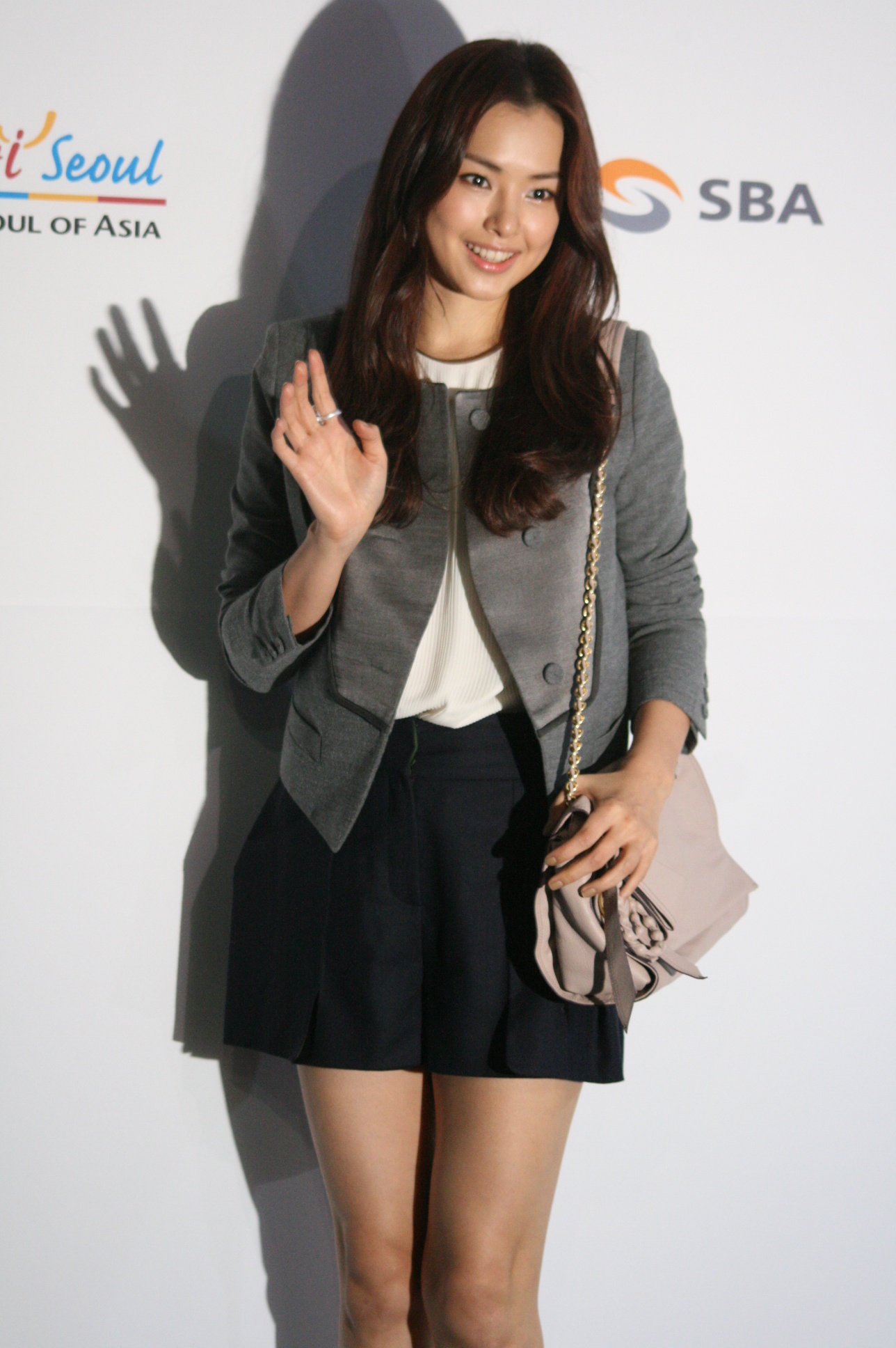 2011 추계서울패션위크